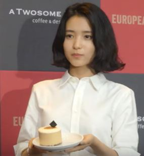 21일 오후 서울시 강남구 논현동 투썸플레이스 신논현역점에서 '김태리와 함께하는 투썸플레이스 유러피안 페어링' 행사가 열렸다